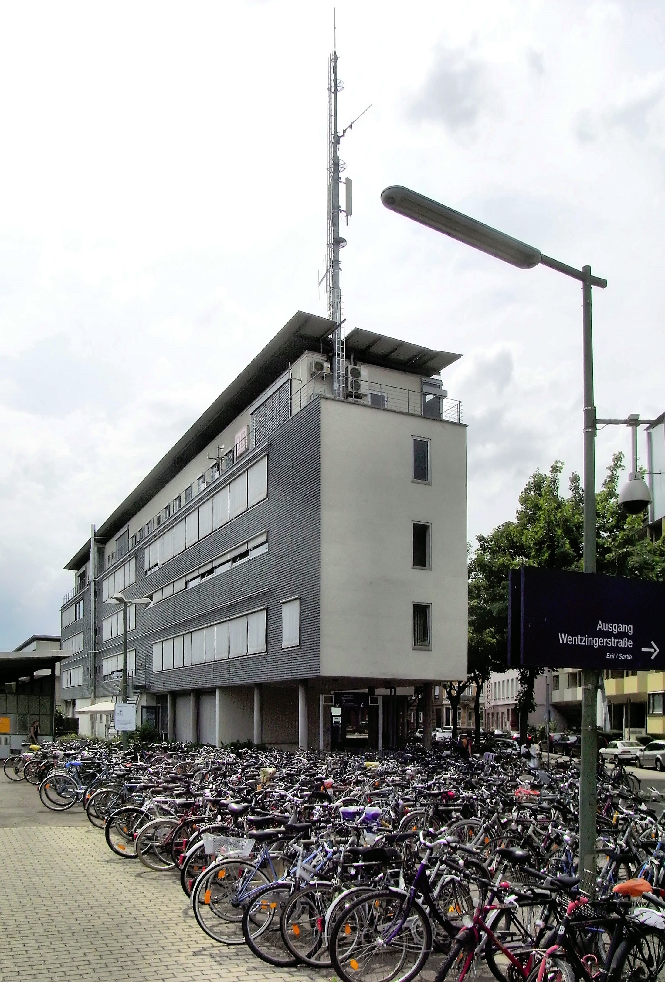 Bilder des Freiburger Hauptbahnhofs Betriebsgebäude mit Sendemast